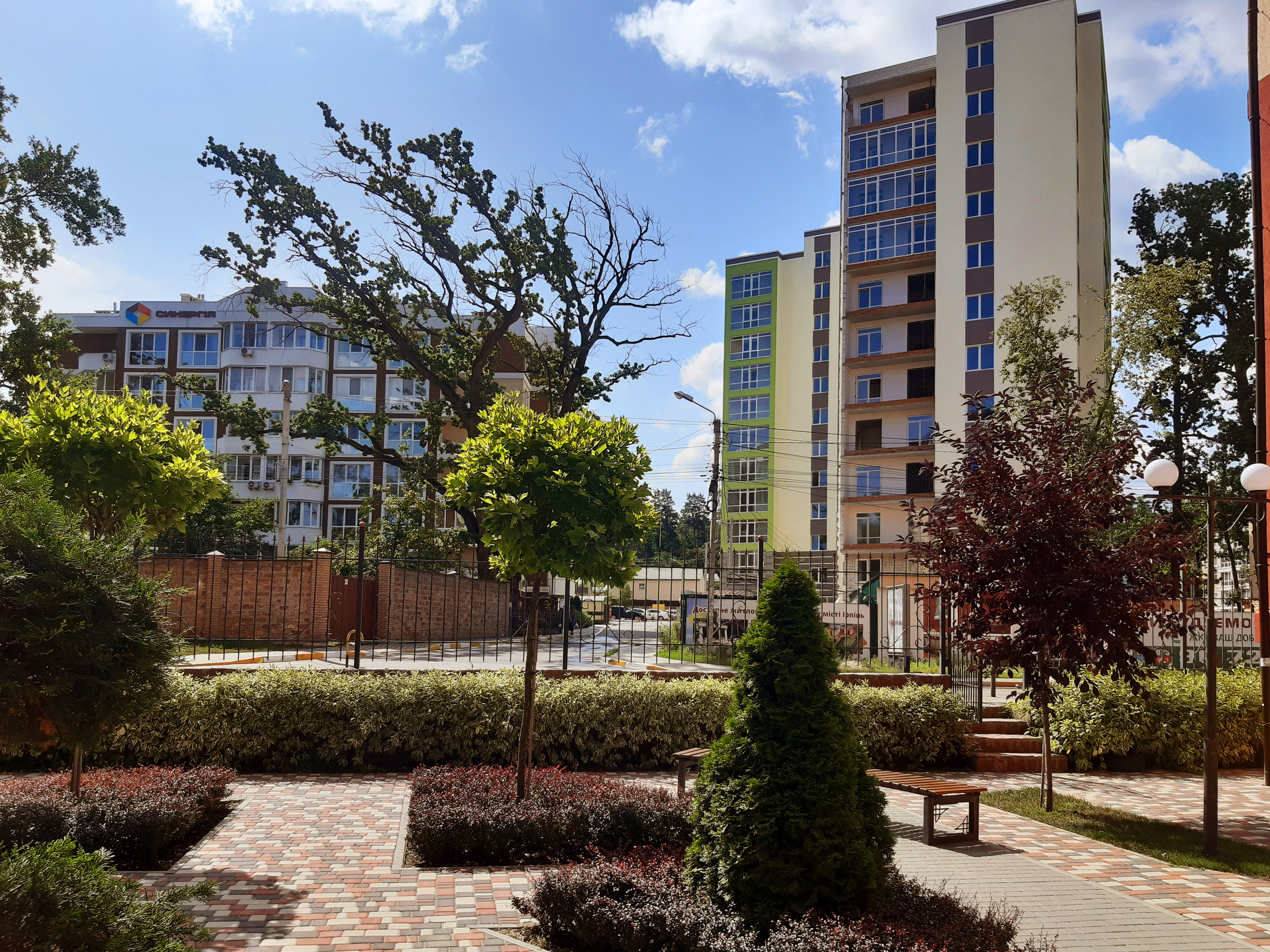 ЖК «Ваш добробут» (справа), ЖК «Синергія-1» (зліва), дуб «Прадуб» (між ними). Урочище Пилипів Потік. Ірпінь